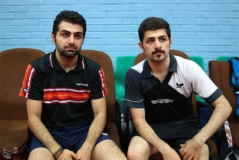 نیما (راست) و نوشاد عالمیان